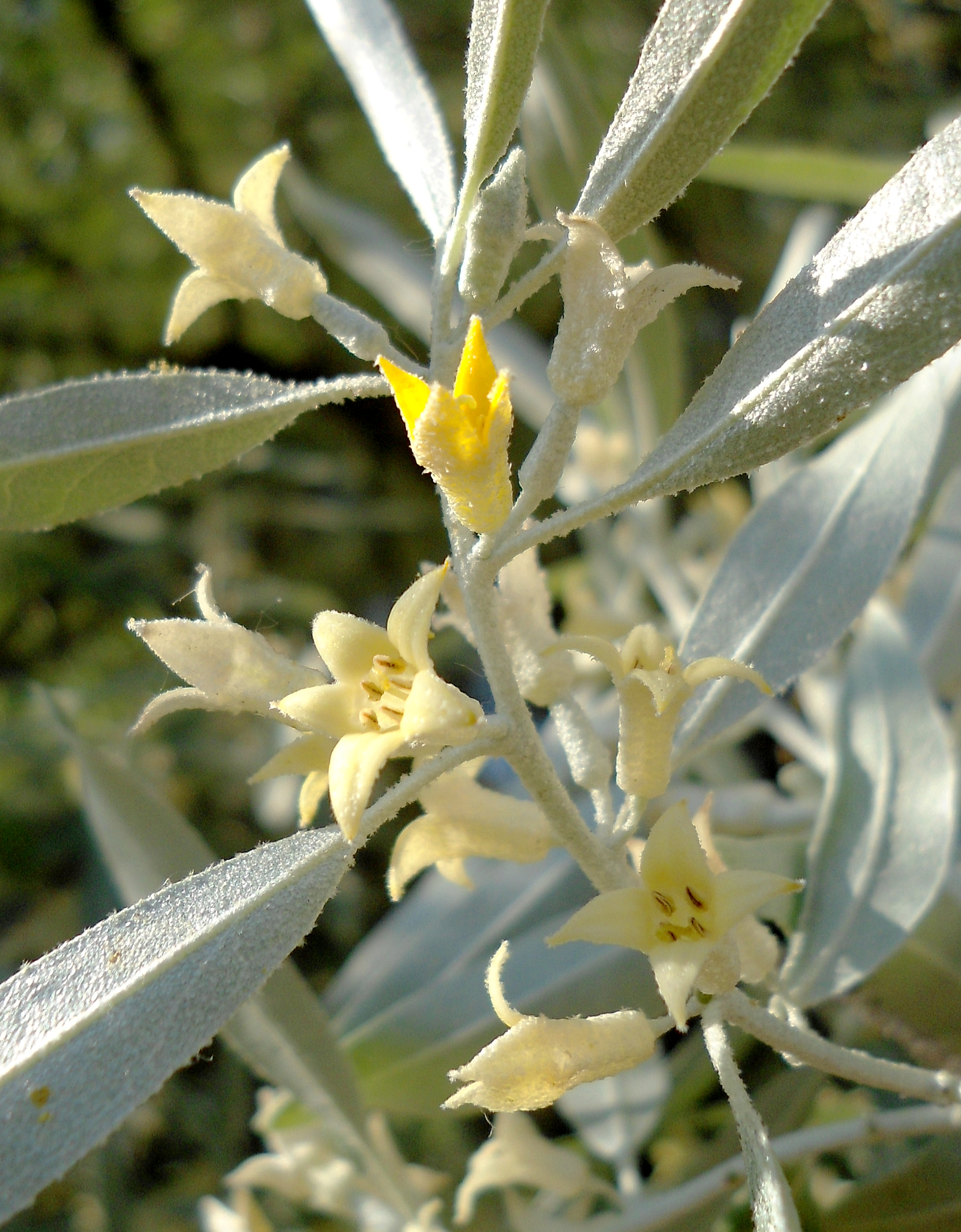 Цветове и листа на Elaeagnus angustifolia.